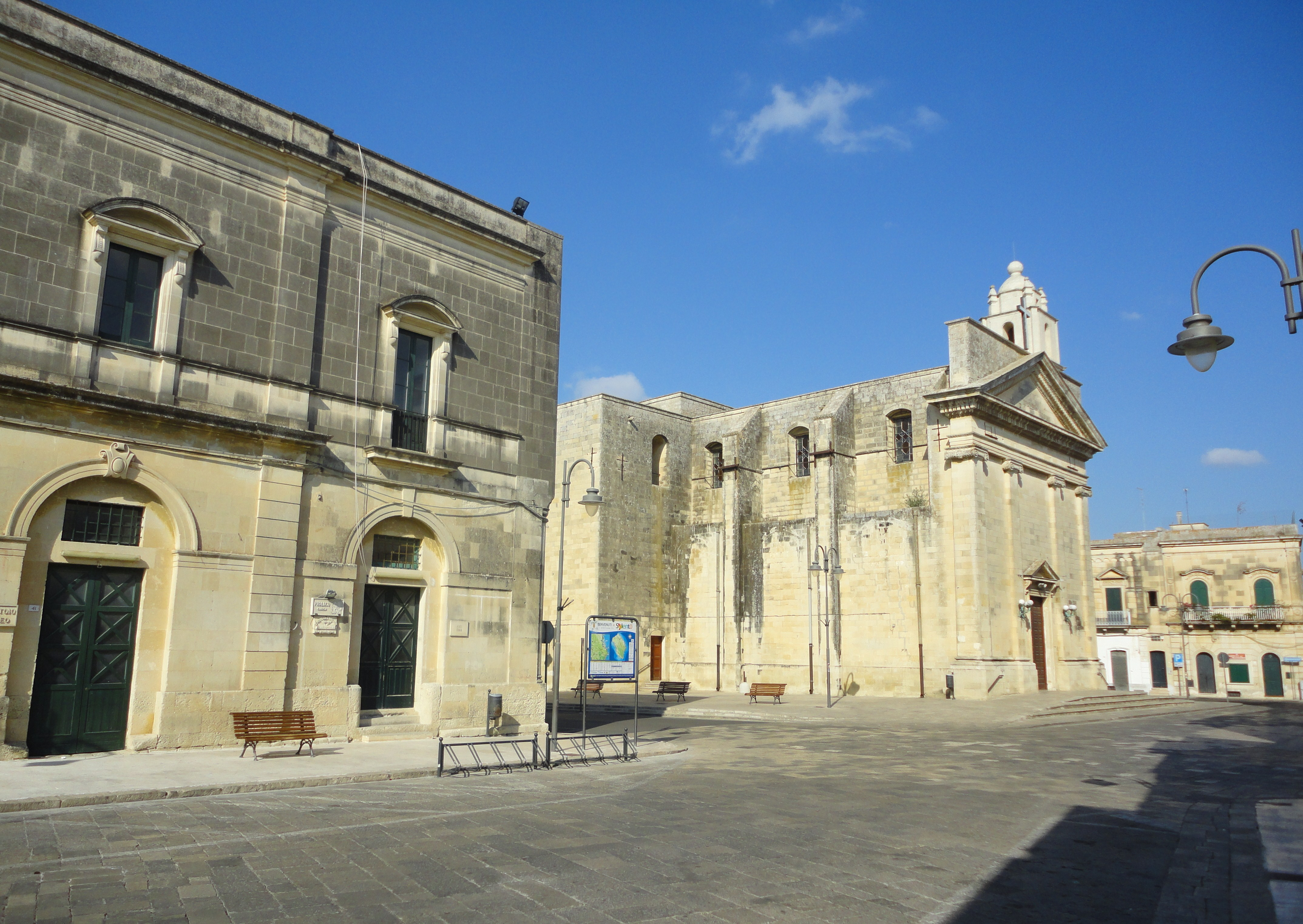 Scorcio di Piazza Pio XII a Cursi, Lecce